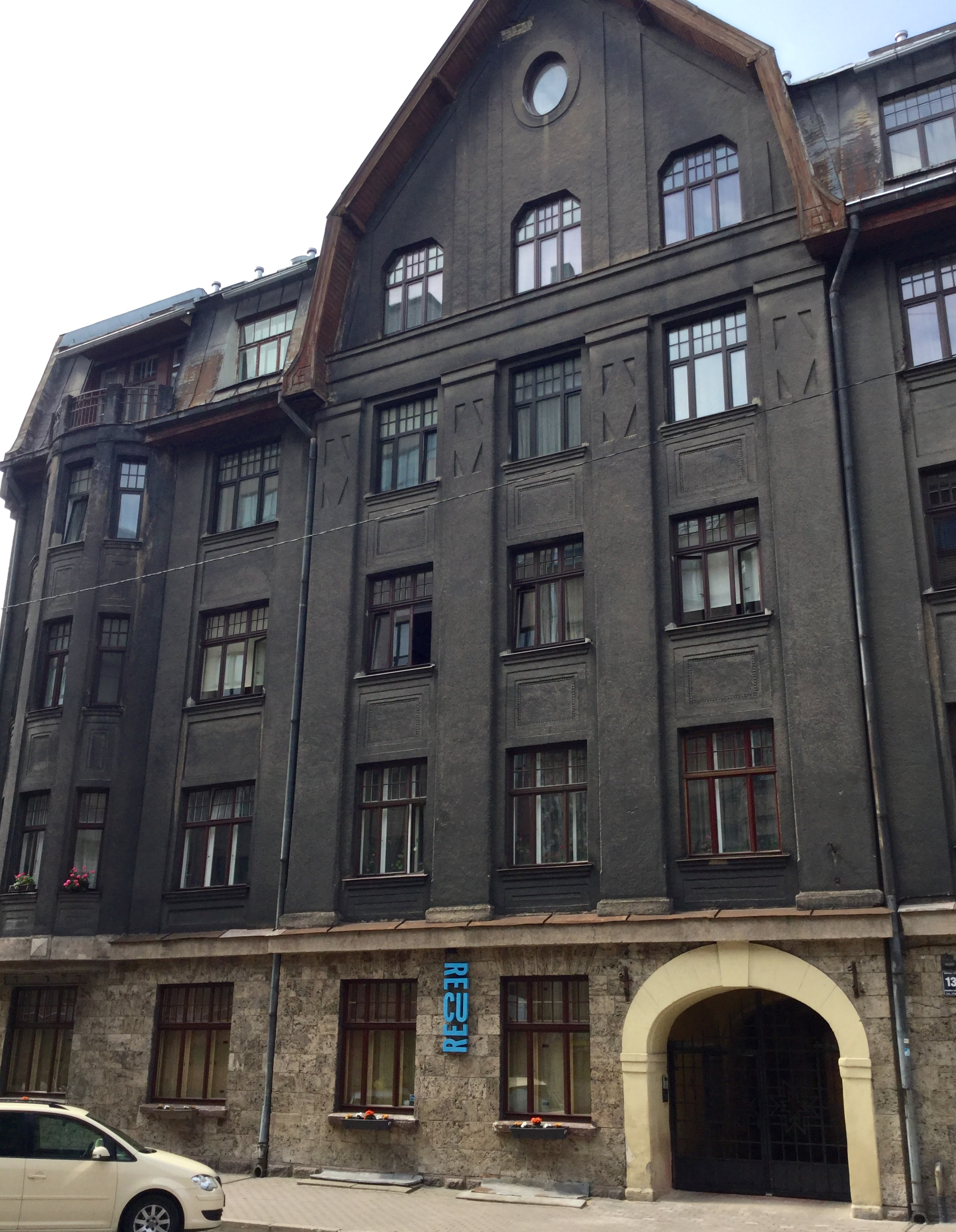 Īres nams ar veikalu, Rīga, Baznīcas iela 13